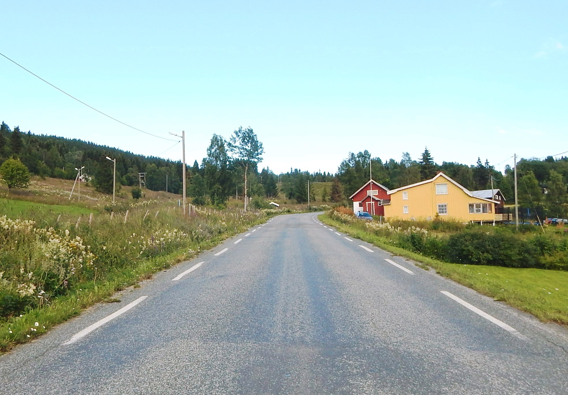 Fylkesvei 2524 (tidl. 313) i Saksumdal